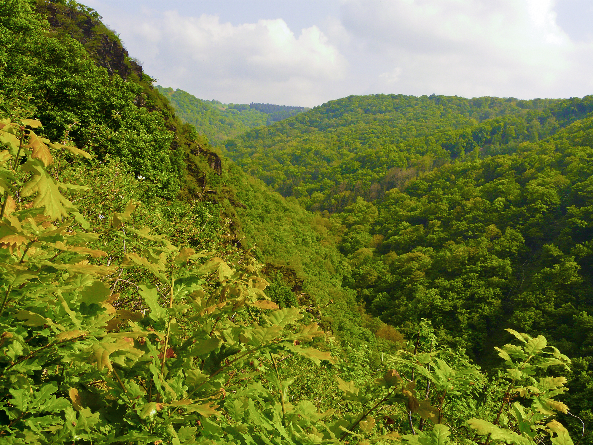 Naturschutzgebiet „Rheinhänge von Burg Gutenfels bis zur Loreley“ (NSG 7141-004): Naturnahe Eichenwalddecke im Urbachtal.